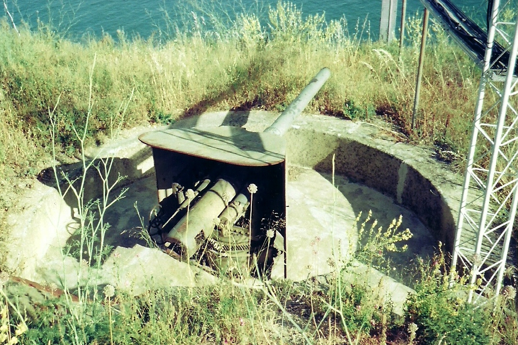 Forte de Almada, freguesia e concelho de Almada, distrito de Setúbal, Portugal: antiga peça de artilharia.